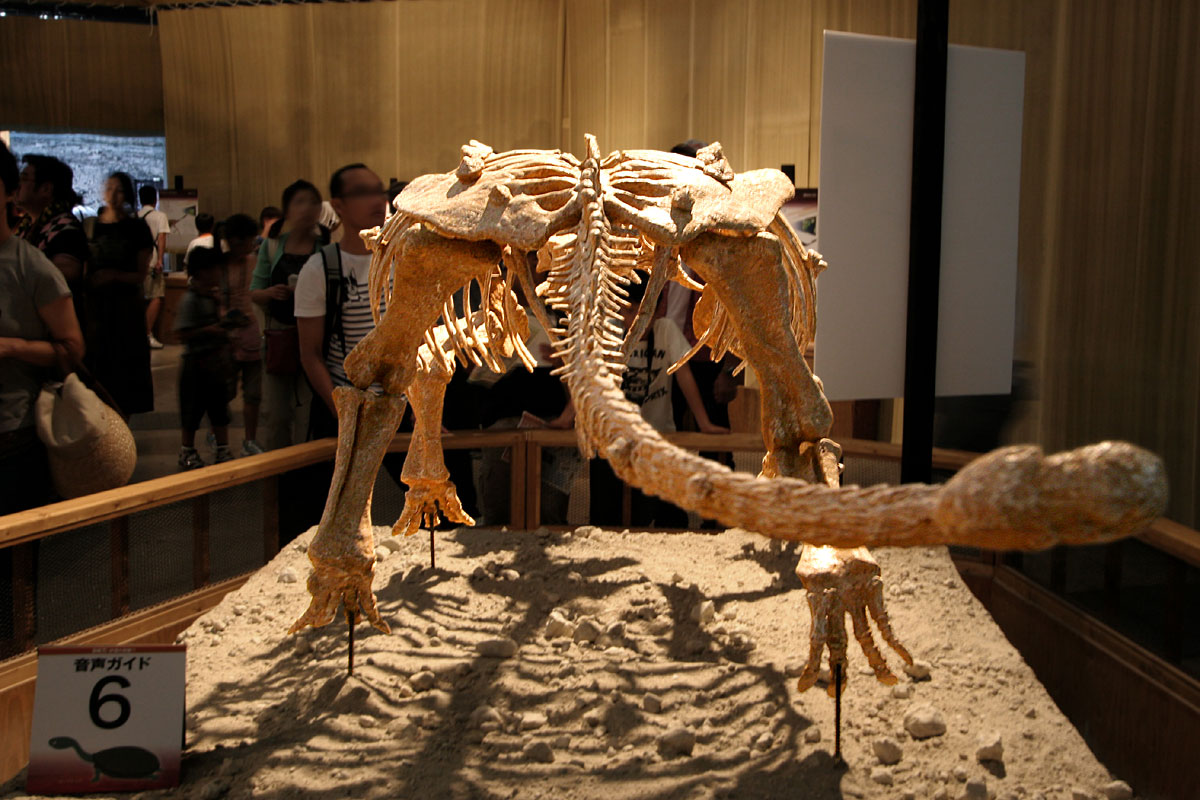 Pinacosaurus - 03